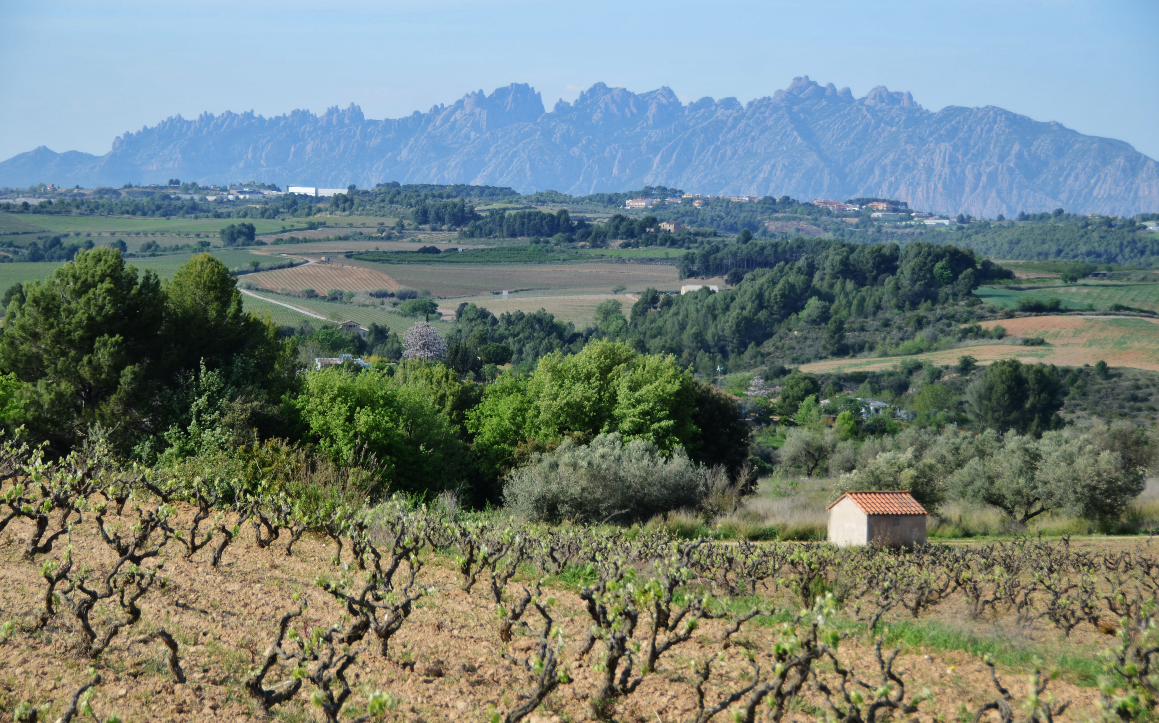 Montserrat This is a a photo of a natural area in Catalonia, Spain, with id: ES510139